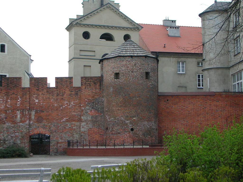 Baszta Dorotka w Kaliszu. Autor:Bartek Wawraszko (Bast)